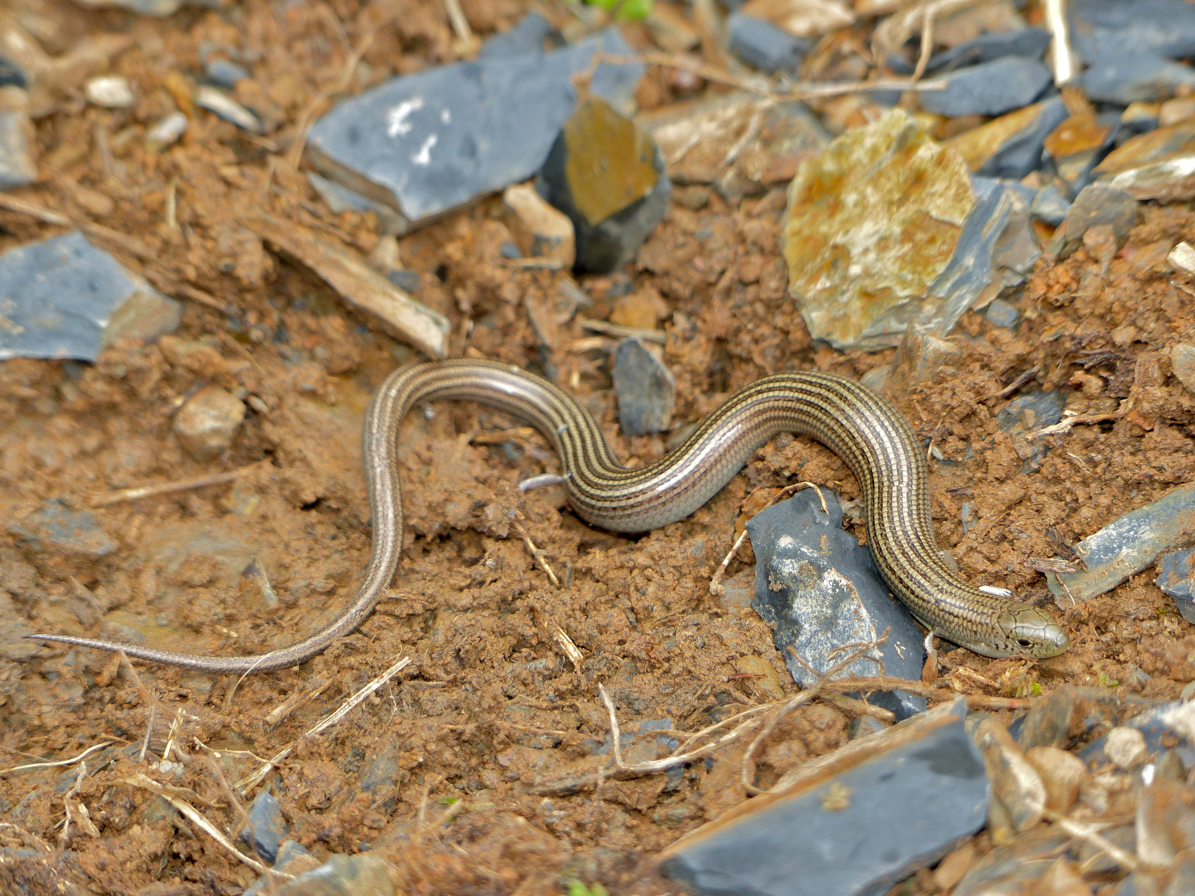 Dobres, La Vega de Liébana, Cantabria, SPAIN